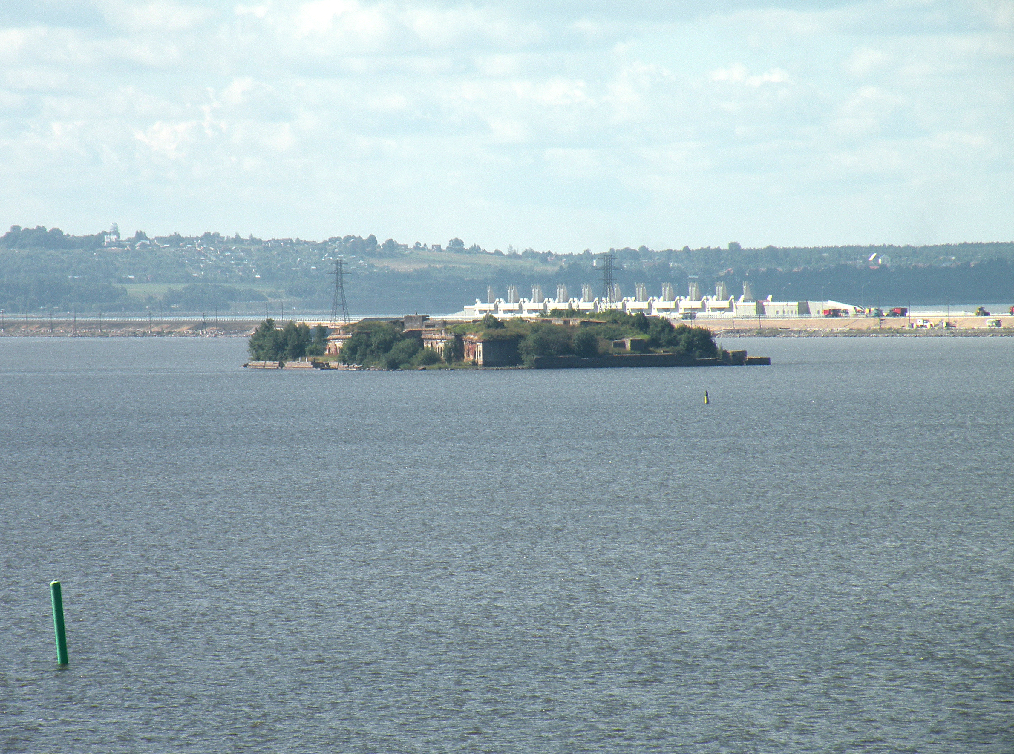 Форт Милютин